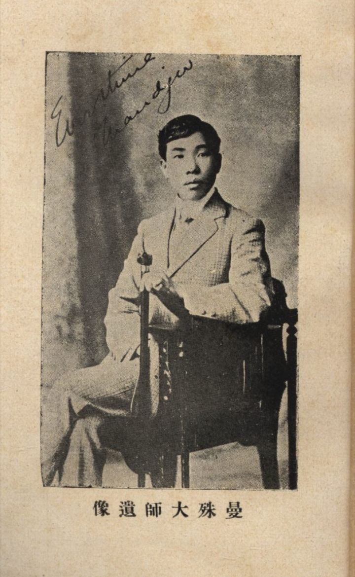 蘇曼殊（1884年9月28日－1918年5月2日），本名戩（一說:宗之助），字子榖，小字三郎，法號曼殊，後更名元瑛（一說：玄瑛）。其先日本人，不詳其姓。（詳柳亞子《曼殊新傳》）（或詳文公直《蘇曼殊年譜》，柳亞子參訂）廣東香山（今廣東珠海）人。中國清末民初詩人、作家、畫家、翻譯家。因常作漢傳佛教出家人形象，也被稱為詩僧，爲「民國三大詩僧」之一（餘二爲釋弘一、釋敬安）。